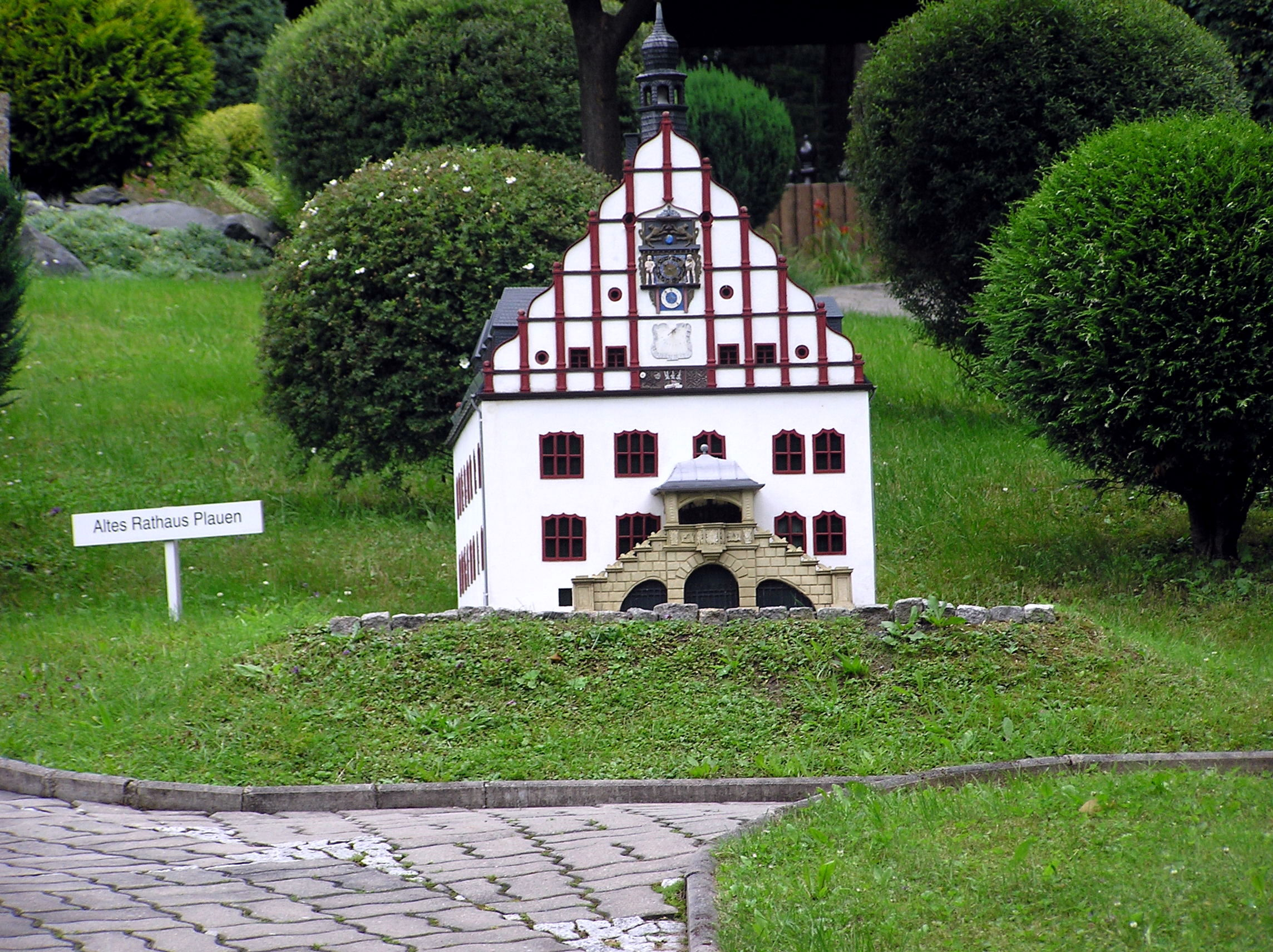 Miniatur-Nachbildung des Alten Rathauses in Plauen in der Miniatur-Schauanlage Klein-Vogtland in Adorf.